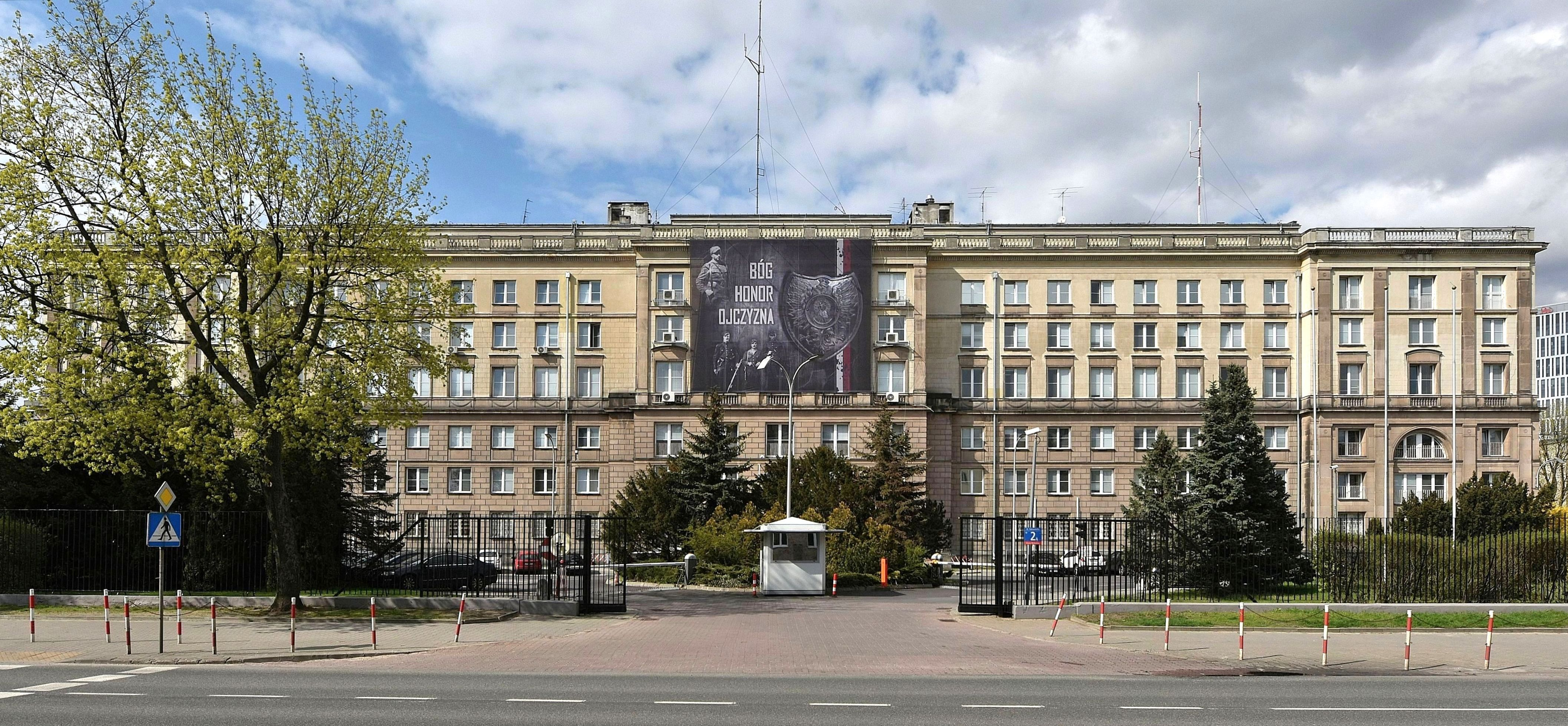 Ministerstwo Spraw Wewnętrznych i Administracji od strony ul.. Rakowieckiej